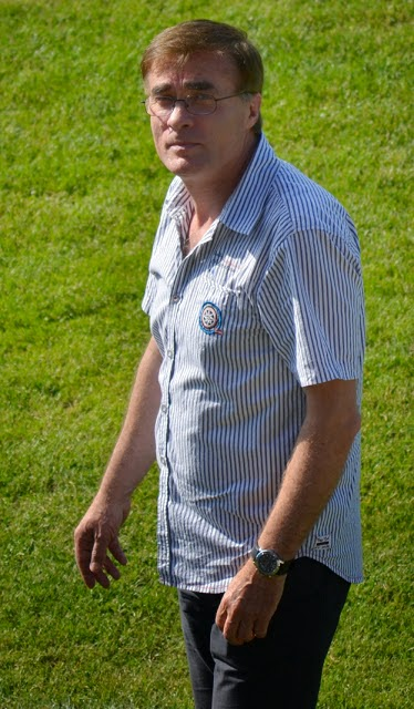 FOTO